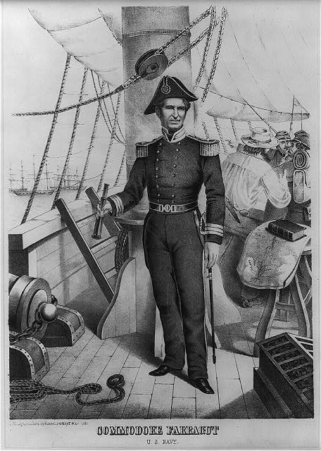 "Commodore Farragut." American admiral David Farragut (1801-1870).